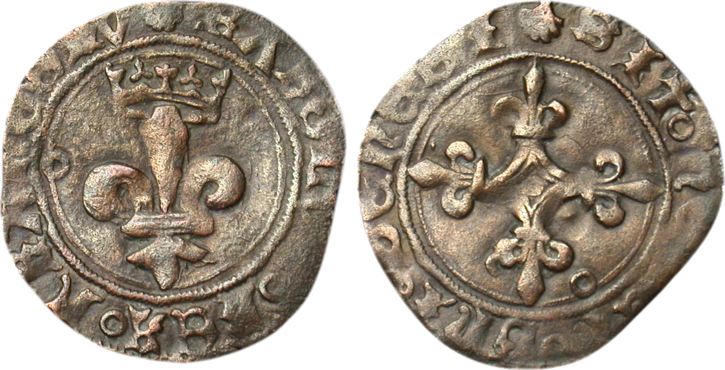 Nom de l'atelier/ville : Dijon Métal : billon Diamètre : 20mm Axe des coins : 5h. Poids : 1,21g. Titulature avers : (coquille) KAROLV[S]° REX° FRAnCORV, (annelet 14e). Description avers : Grand lis couronné. Traduction avers : (Charles, roi des Francs). Titulature revers : (coquille) SIT° nO[m]En° DnI° BEnEDI, (annelet 8e). Description revers : Croix fleurdelisée, évidée en cœur. Traduction revers : (Béni soit le nom du Seigneur).